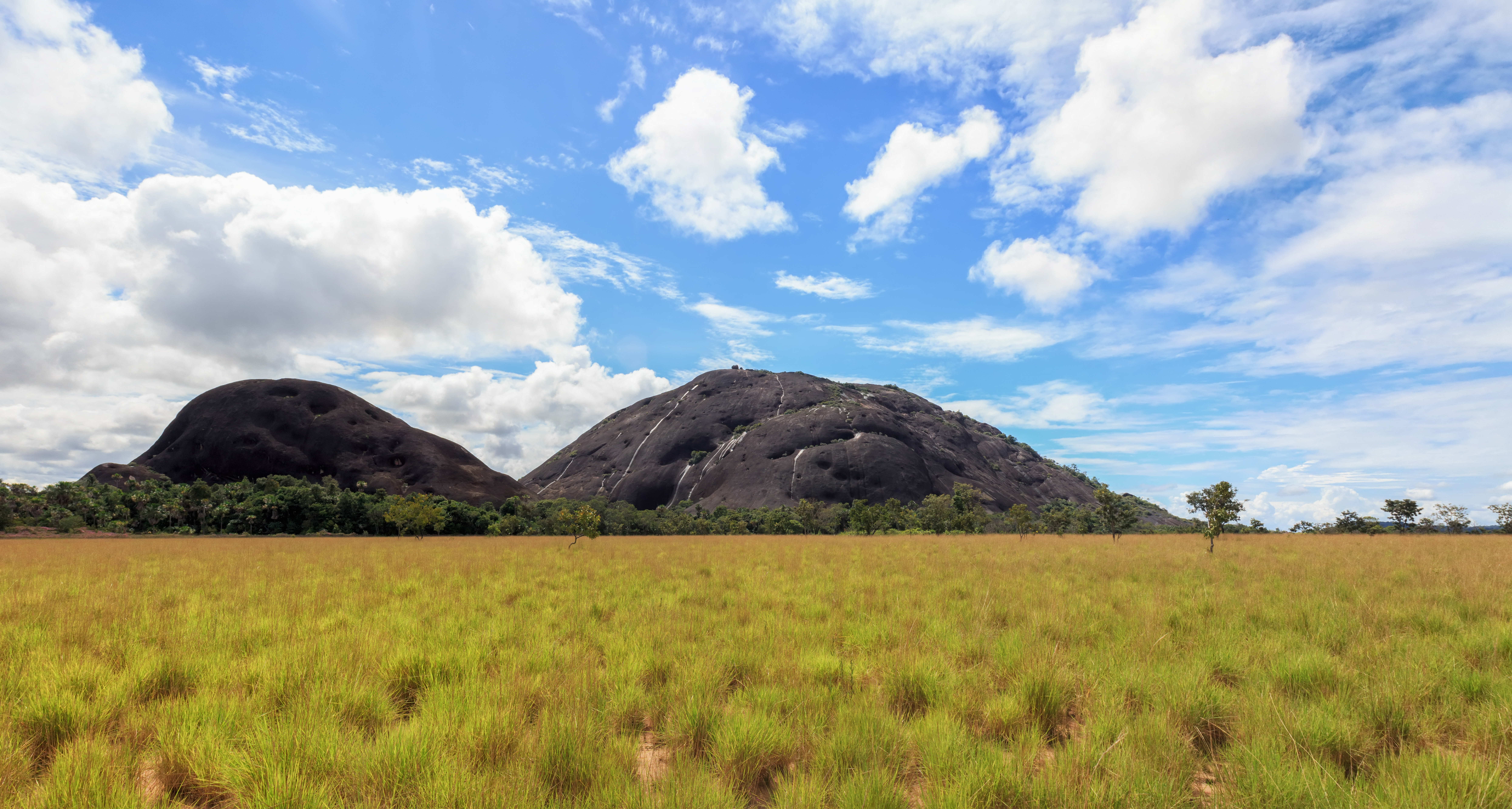 Monumento natural Piedra la Tortuga